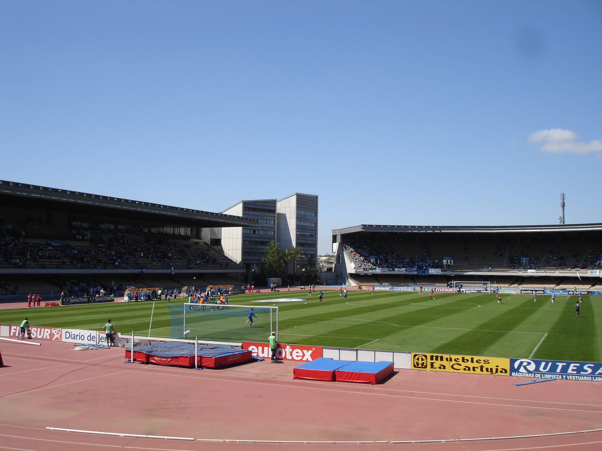 Xerez C.D. playing in Chapín. Jerez de la Frontera (Andalusia, Spain)